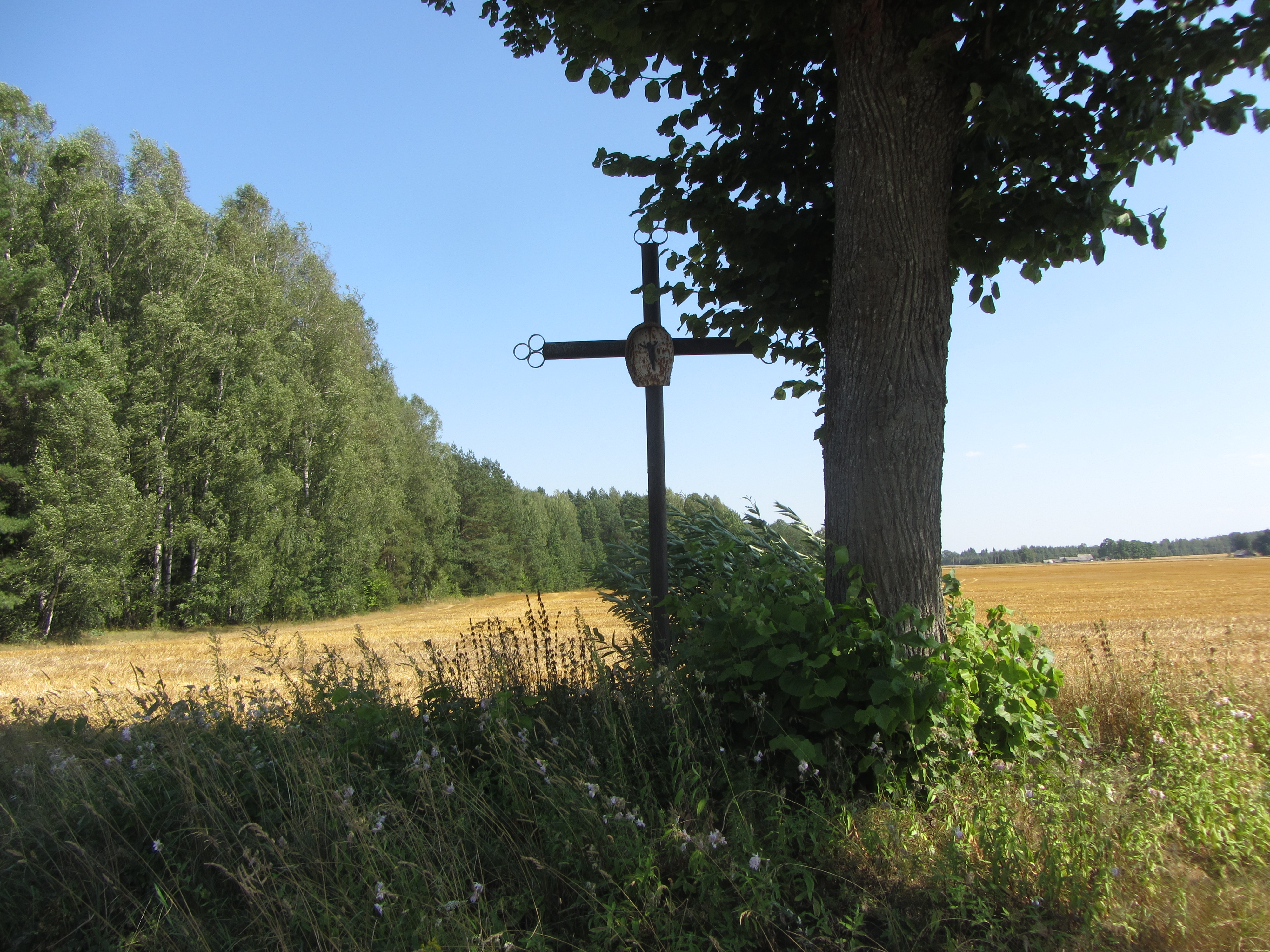 Gerviškių sen., Lithuania